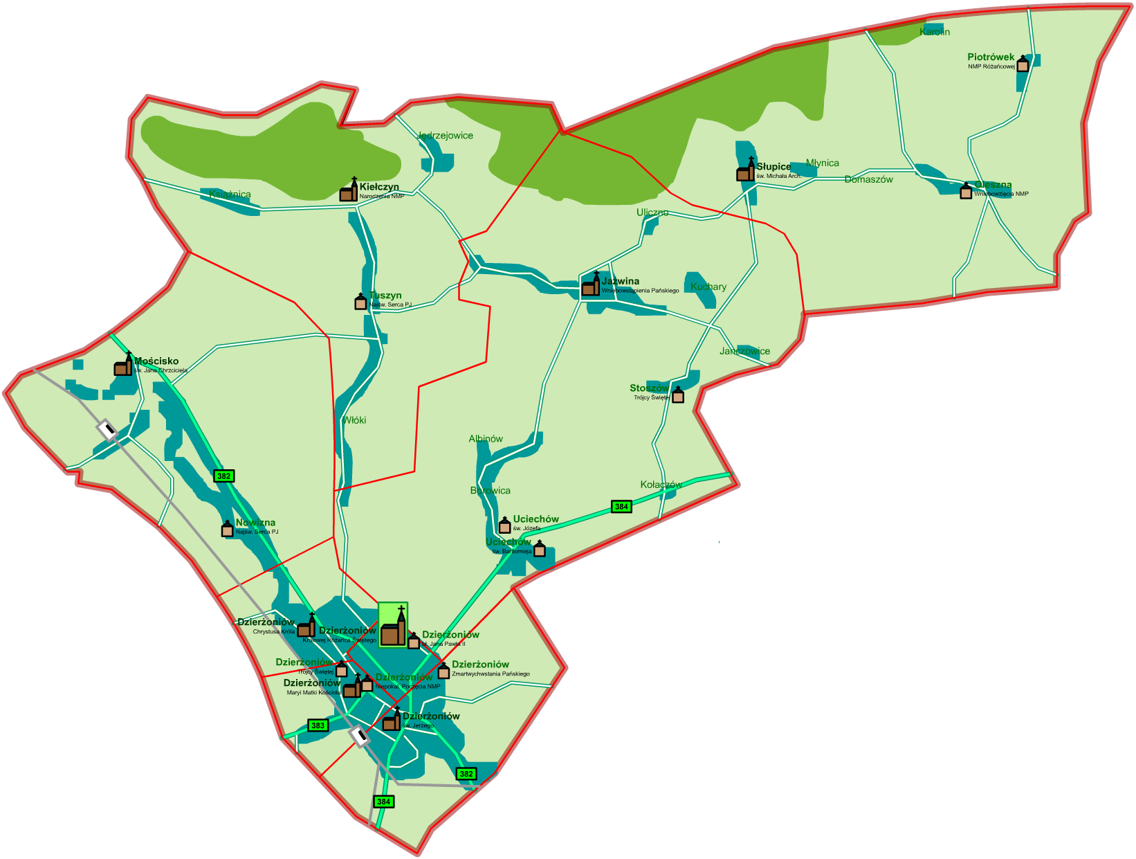 Mapa dekanatu Dzierżoniów.